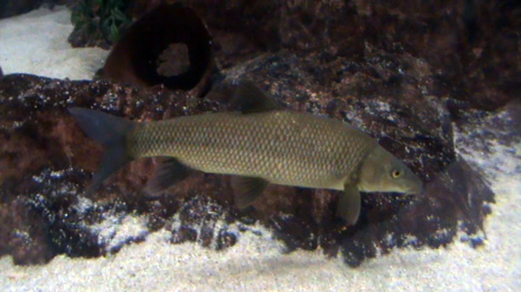 Luciobarbus microcephalus en el fluviário de Mora (Portugal)